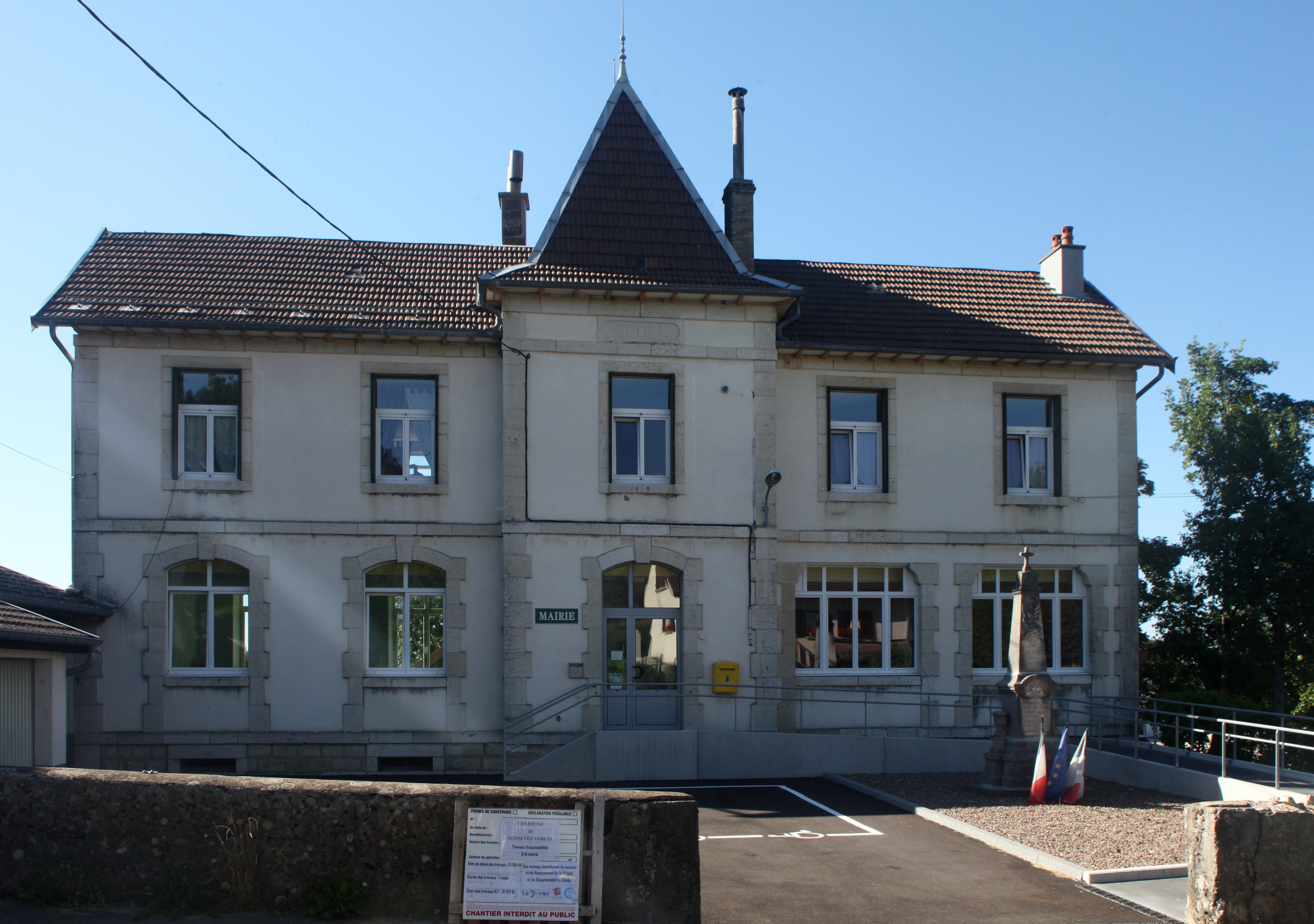 Mairie d'Adam-les-Vercel (Doubs).